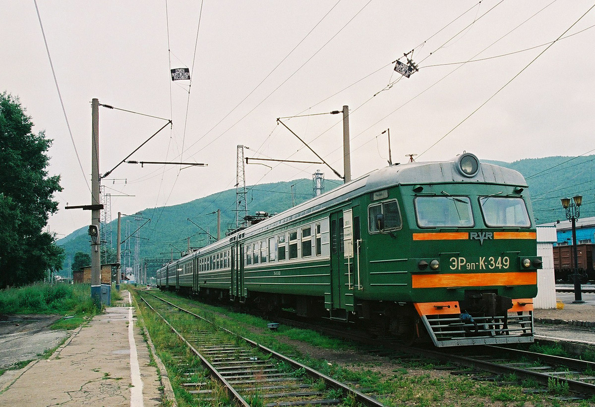 Электропоезд ЭР9ПК-349 Россия, Иркутская область, станция Слюдянка-I